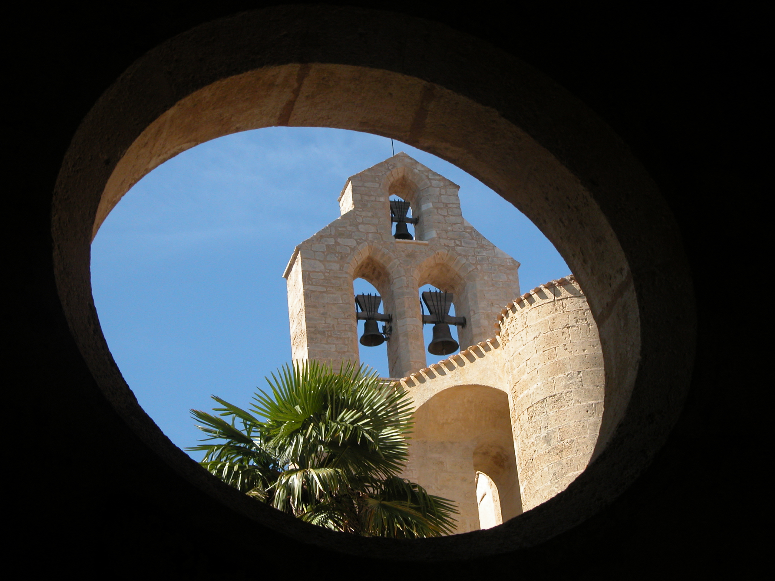 Abbaye de Valmagne - Photo personnelle.